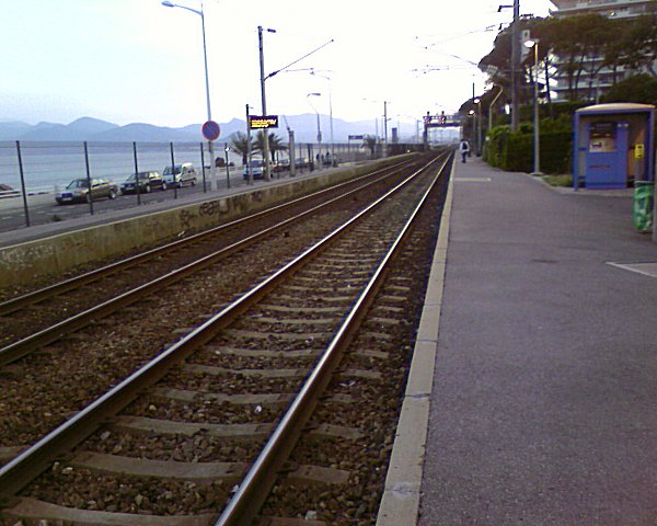 La Bocca Station, Cannes.